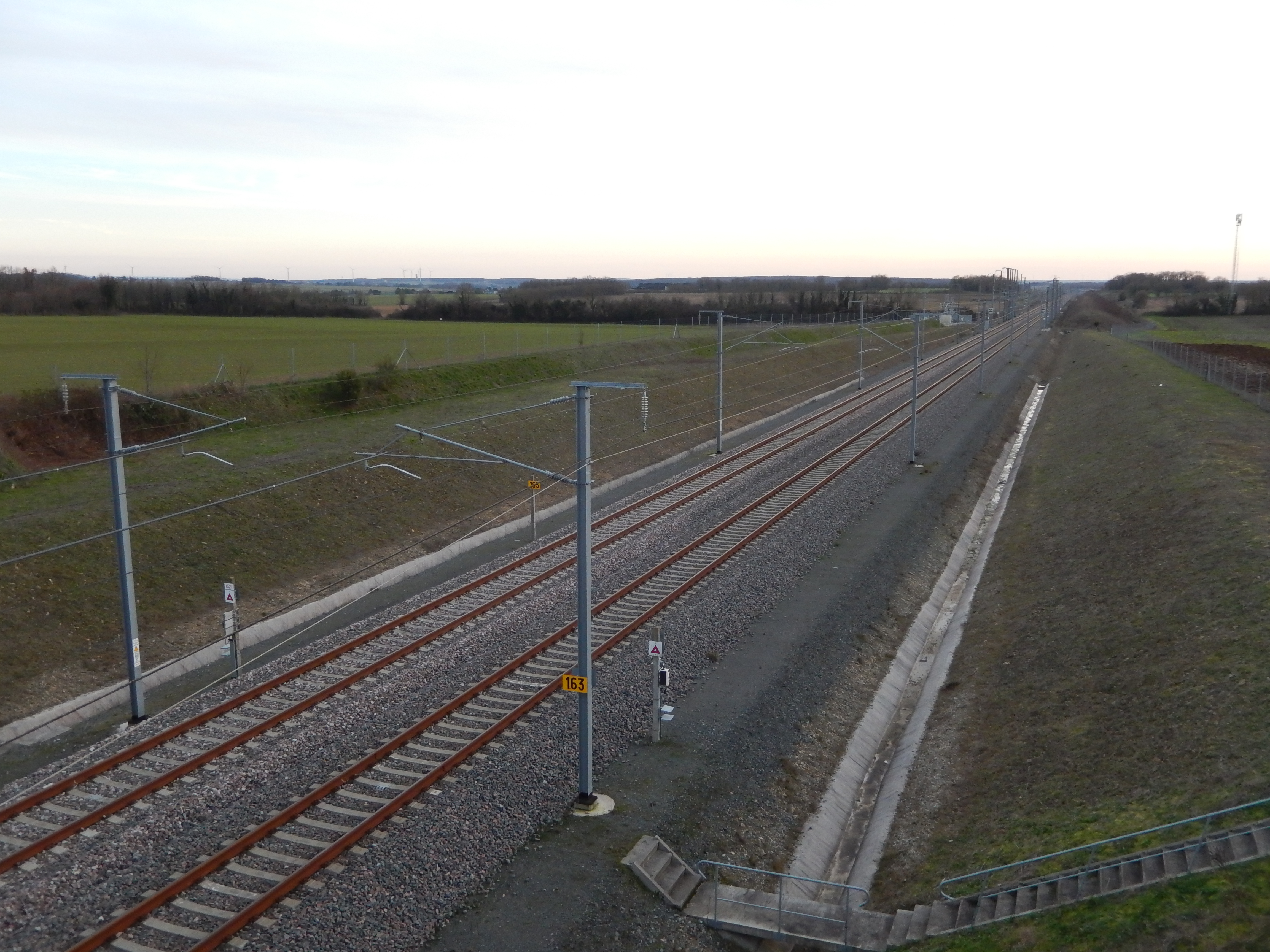 La ligne de chemin de fer à grande vitesse Sud-Europe-Atlantique, à quelques centaines de mètres du village de Raix, dans le département de la Charente. Cette vue est orientée vers l'extrémité méridionale de la ligne.